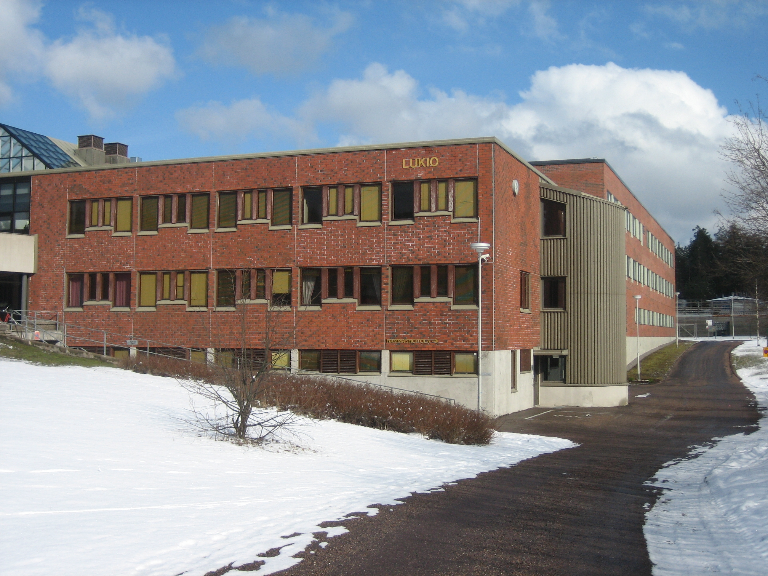 Vihdin lukio